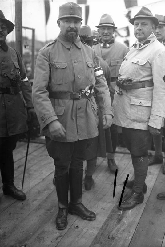 Der österreichische Heimwehrführer Dr. Pfriemer hat sich freiwillig den Gerichtsbehörden in Graz gestellt! Dr. Pfriemer war nach dem September-Putsch der Heimwehr in Österreich in Ausland geflüchtet und hat sich zu dem am 14. Dezember stattfinden Prozess den Behörden gestellt.